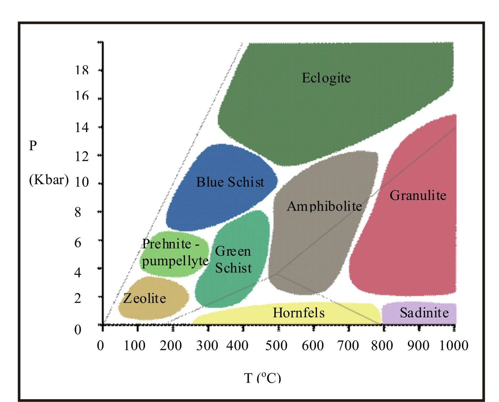 Gambar Fasies Metamorfisme